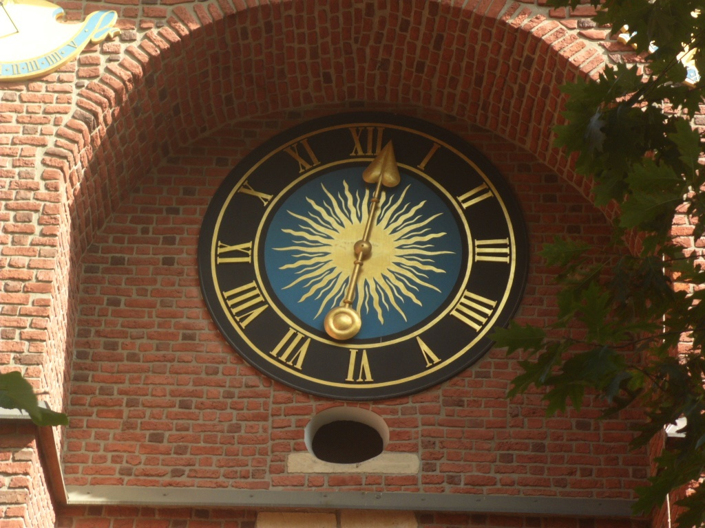 Kließelseeger heißt in Breslau die Uhr der Barbarakirche (heute Kathedrale der Geburt der seligen Jungfrau Maria), die als erste schlägt. Wenn sie schlug, wurden die Klöße eingelegt. Schläsch: Kließelseeger heeßt ei Brassel de Seeger der Barbrakerche, de ols erschte schlägt. Wenn se schlug, wurda de Kließel/Kließla eengeleit.